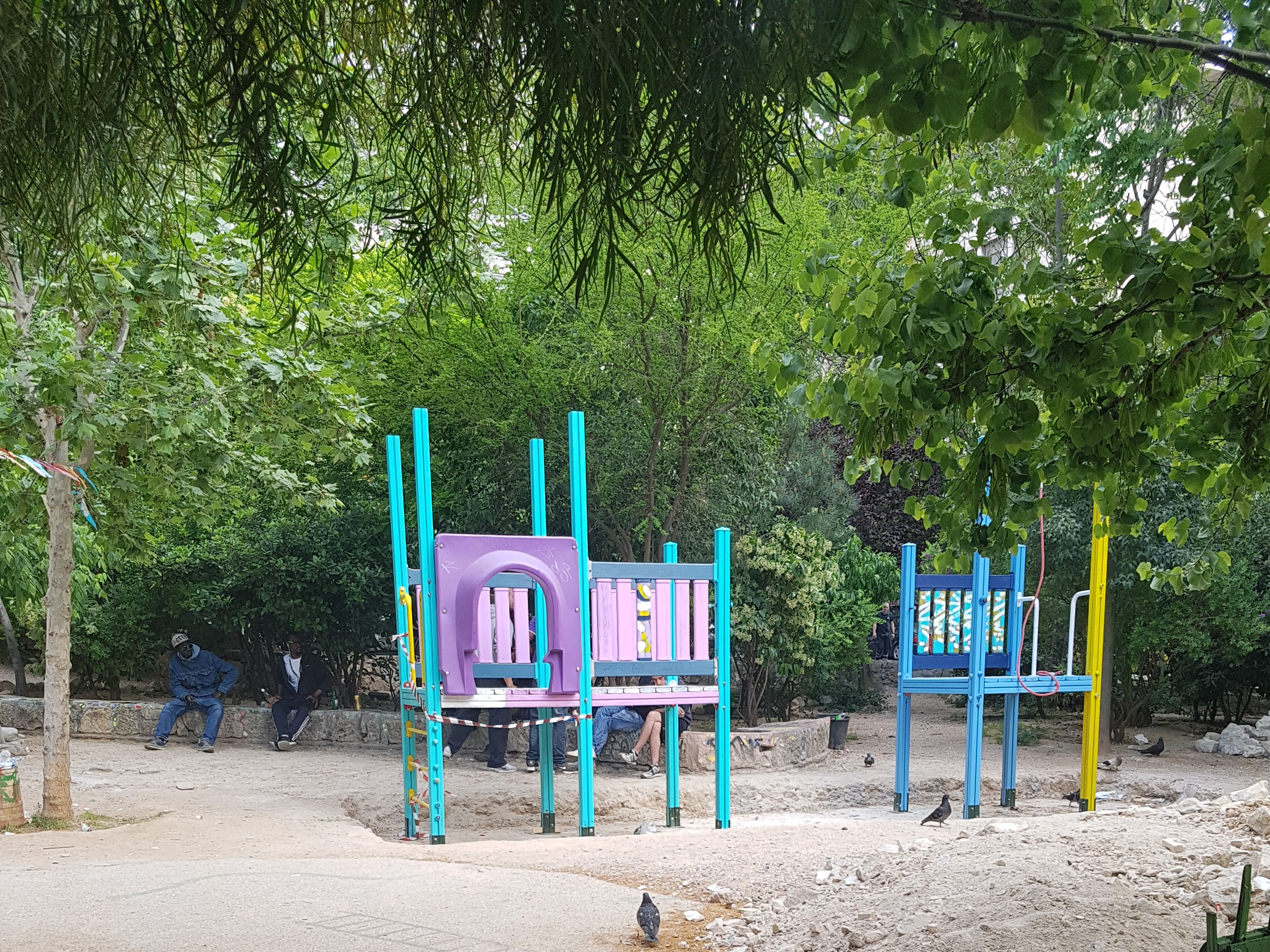 Κατασκευές παιχνιδιών πάρκου Ναυαρίνου